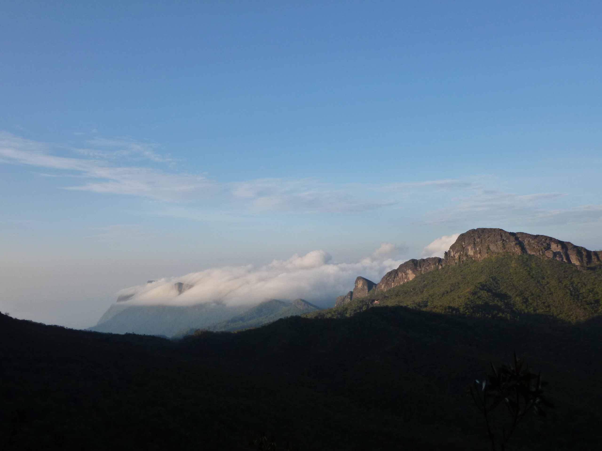 A imponência do Pico da Neblina - Estado do Amazonas - Brasil